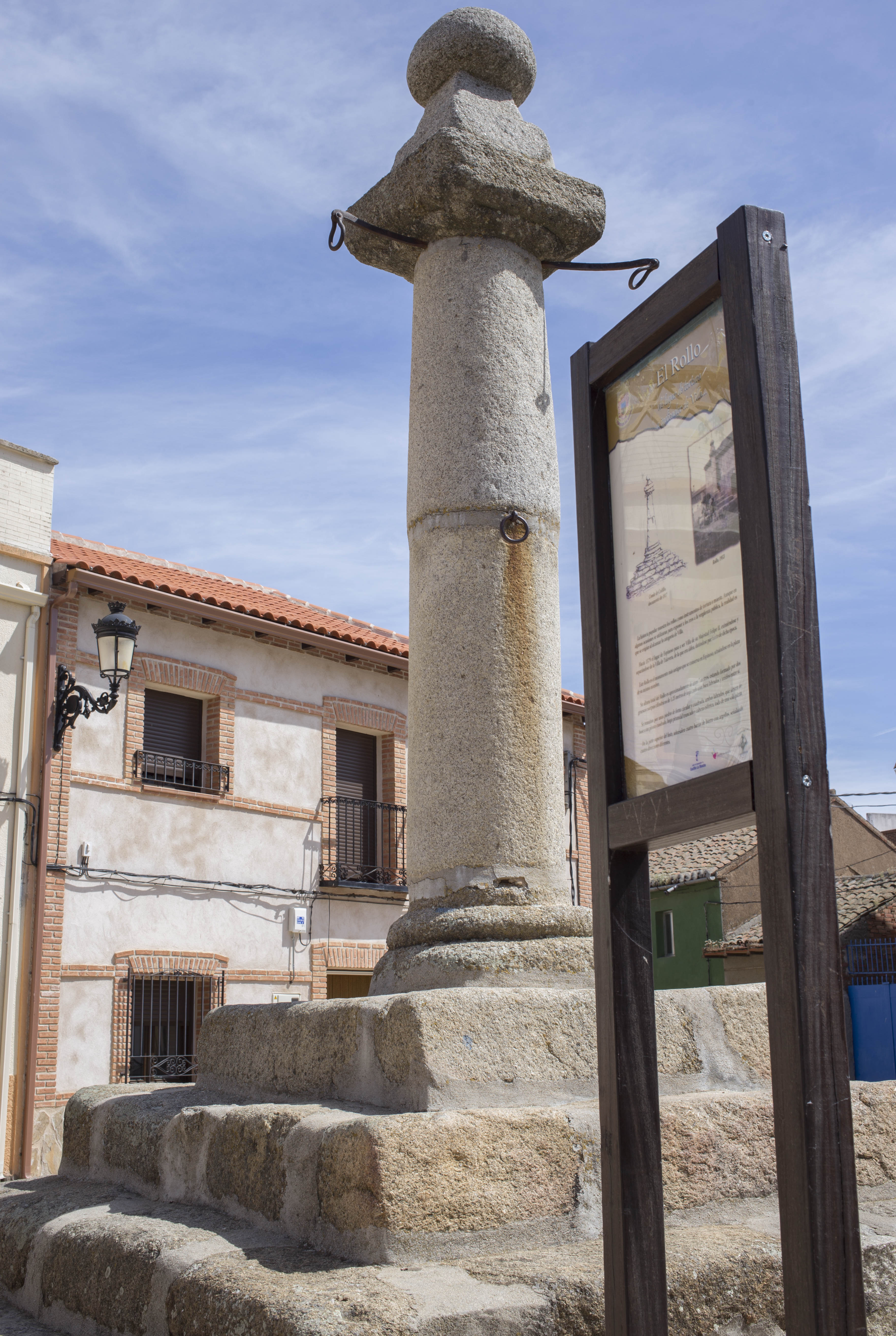 Espinoso del Rey